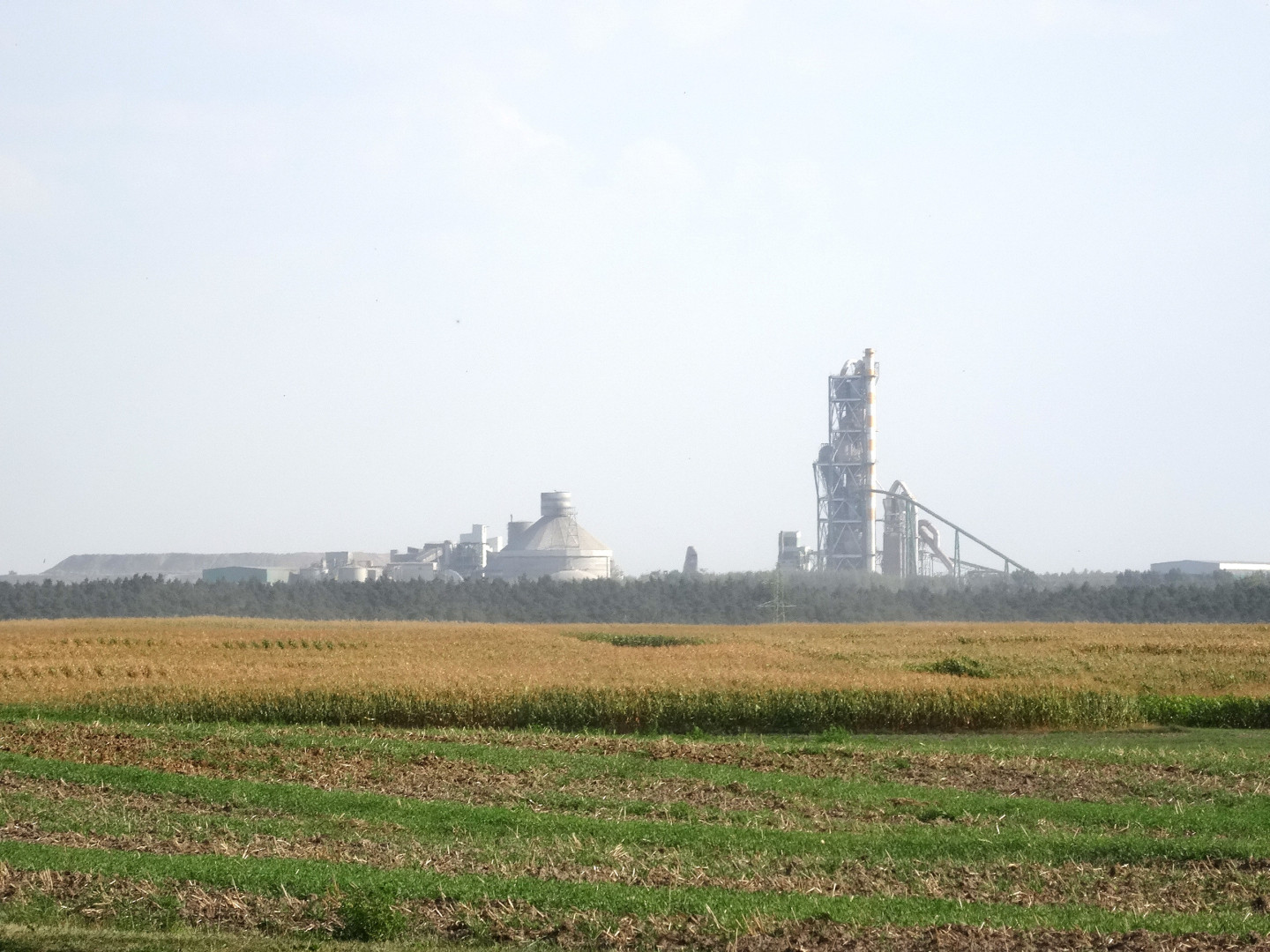 Cementownia Kujawy w Piechcinie k. Barcina, woj. kujawsko-pomorskie